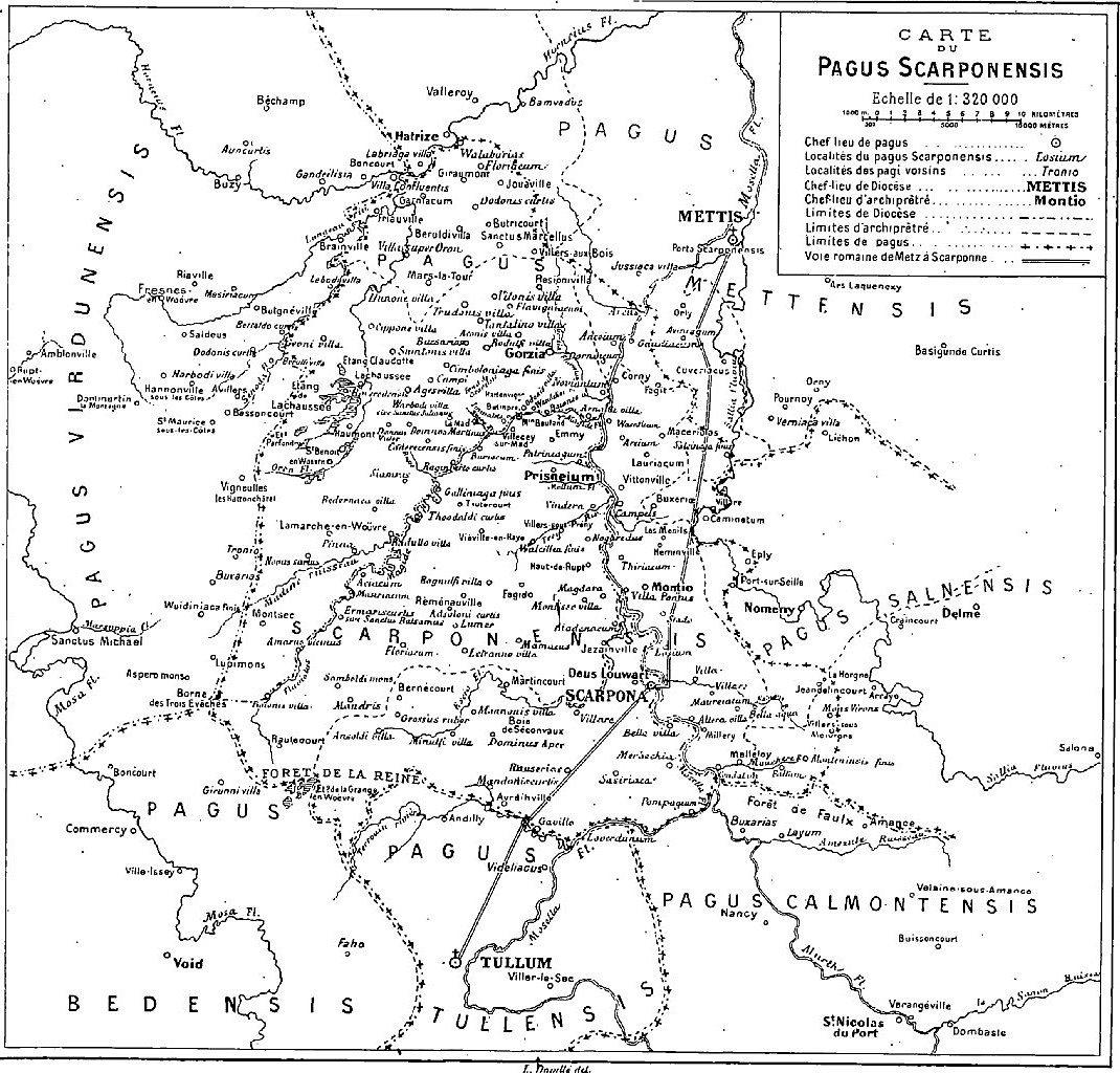 Plan du "Pagus Scarponensis", dans Louis Davillé, "Le pagus Scarponensis", dans Annales de l'Est et du Nord, 1906 This image comes from Gallica Digital Library and is available under the digital ID bpt6k333124/f11.item This tag does not indicate the copyright status of the attached work. A normal copyright tag is still required. See Commons:Licensing.